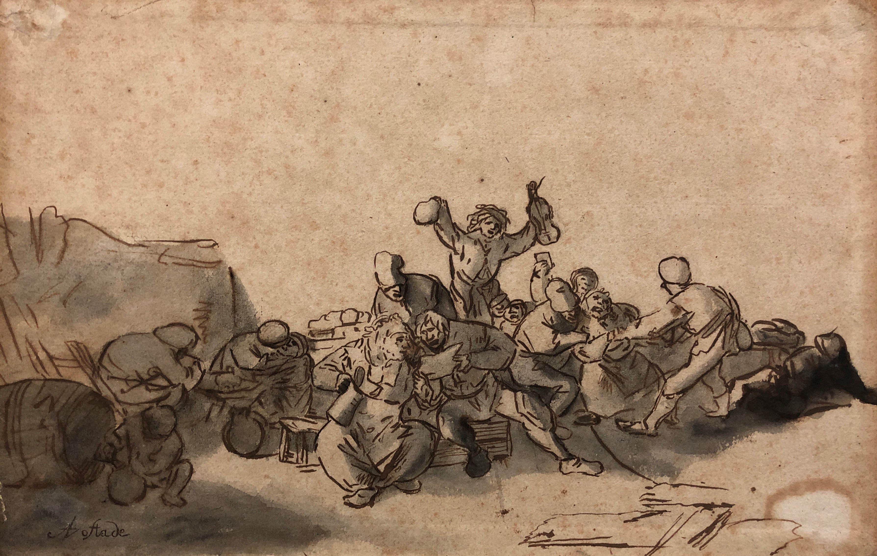 Dieses Werk befindet sich im Privatbesitz und ist in einer Hamburger Wirtschaftskanzlei ausgestellt.